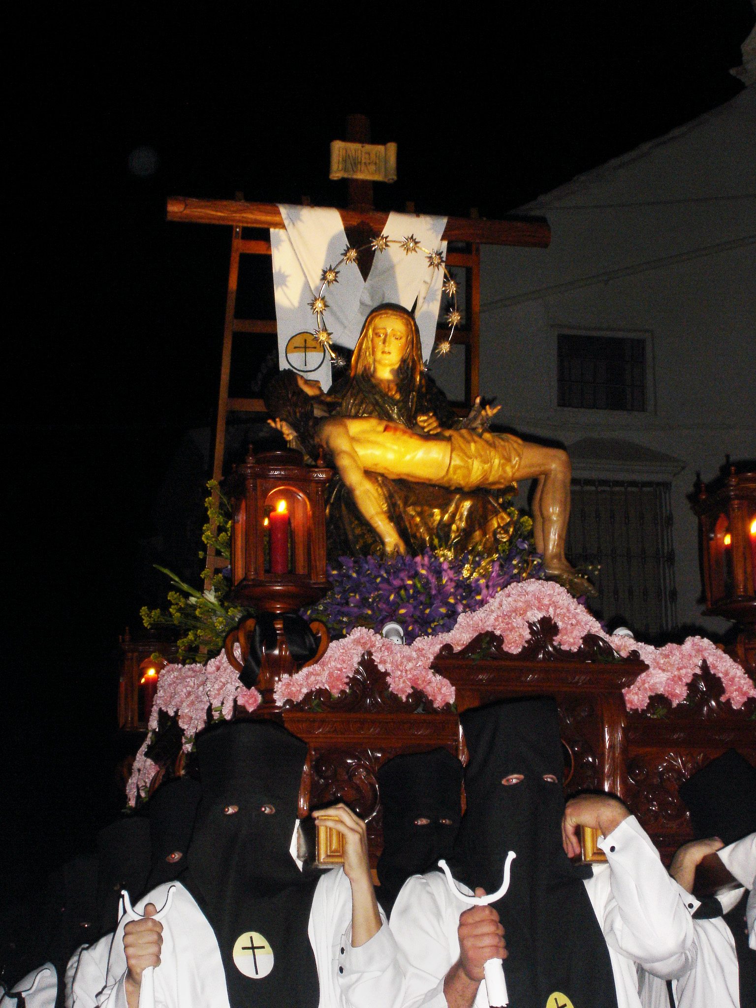 Hermandad de las Angustias en Estepa, provincia de Sevilla (España), durante su salida procesional en Semana Santa.